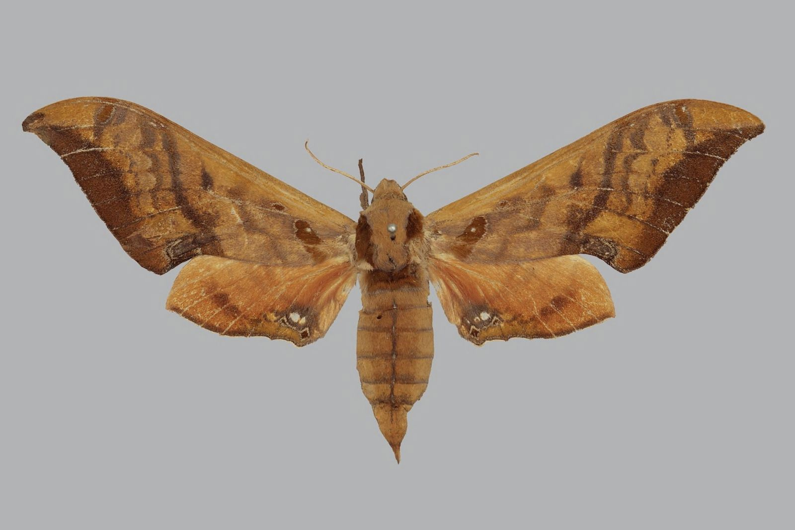 Orecta lycidas, female, upperside.